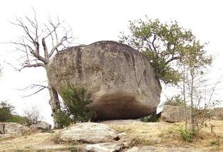 La_pierre_tournisse Torfou.jpg